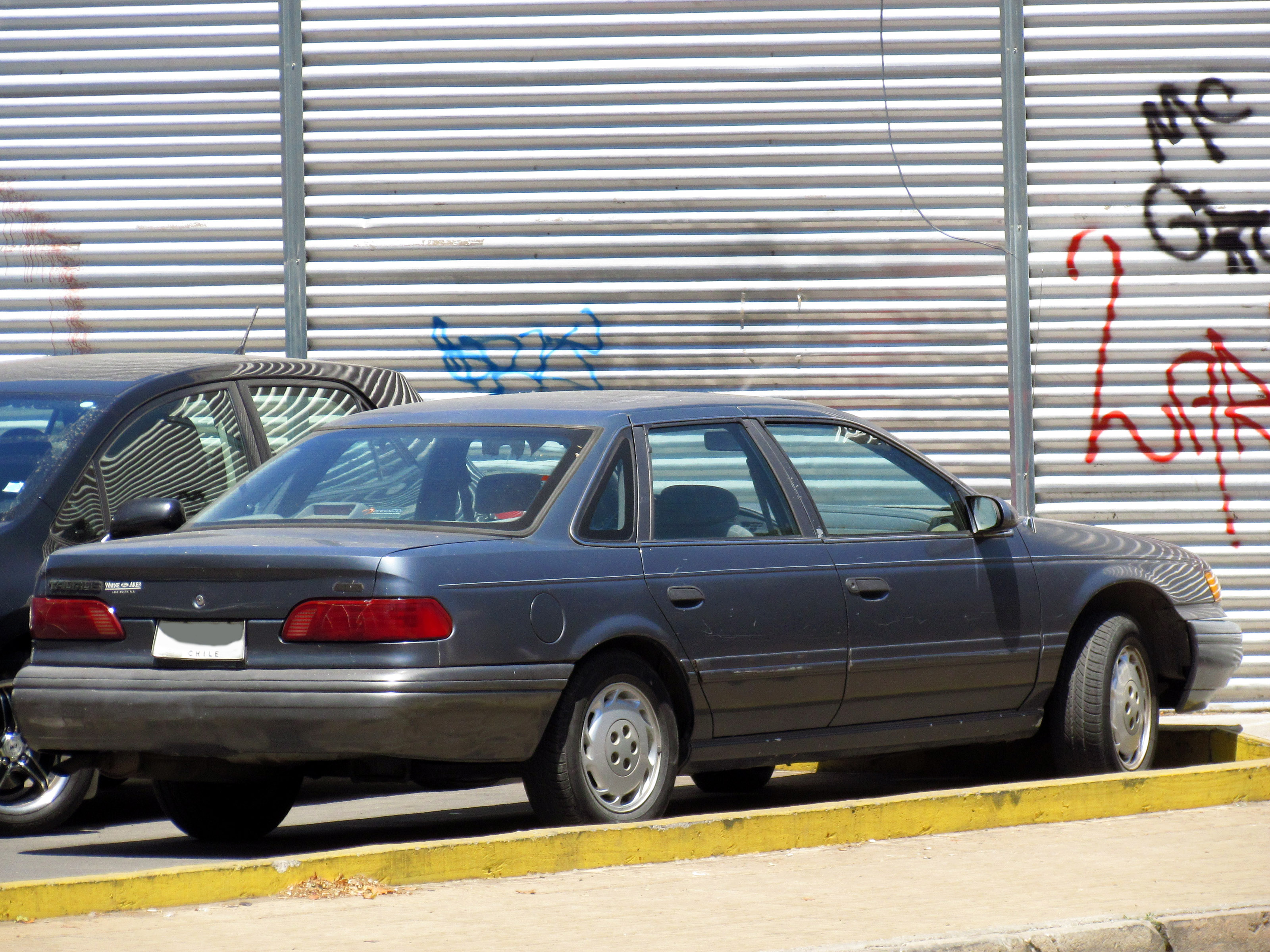 Ford Taurus 3.0 GL 1992